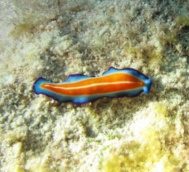 Un ver plat de Suzanne (Pseudoceros susanae) aux Maldives (Dhigu Thila, atoll de Baa).